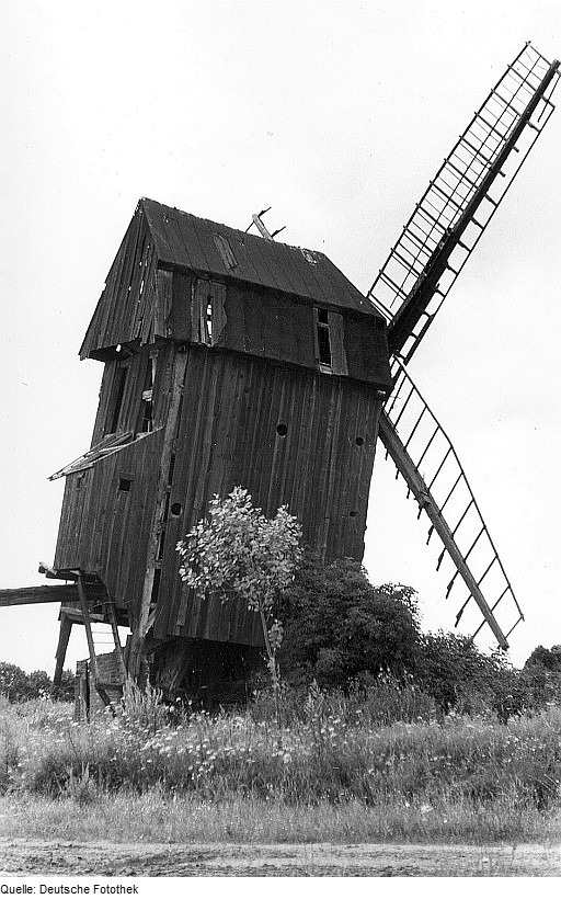 Original image description from the Deutsche Fotothek Niederer Fläming-Hohenahlsdorf. Bockmühle, ruinös